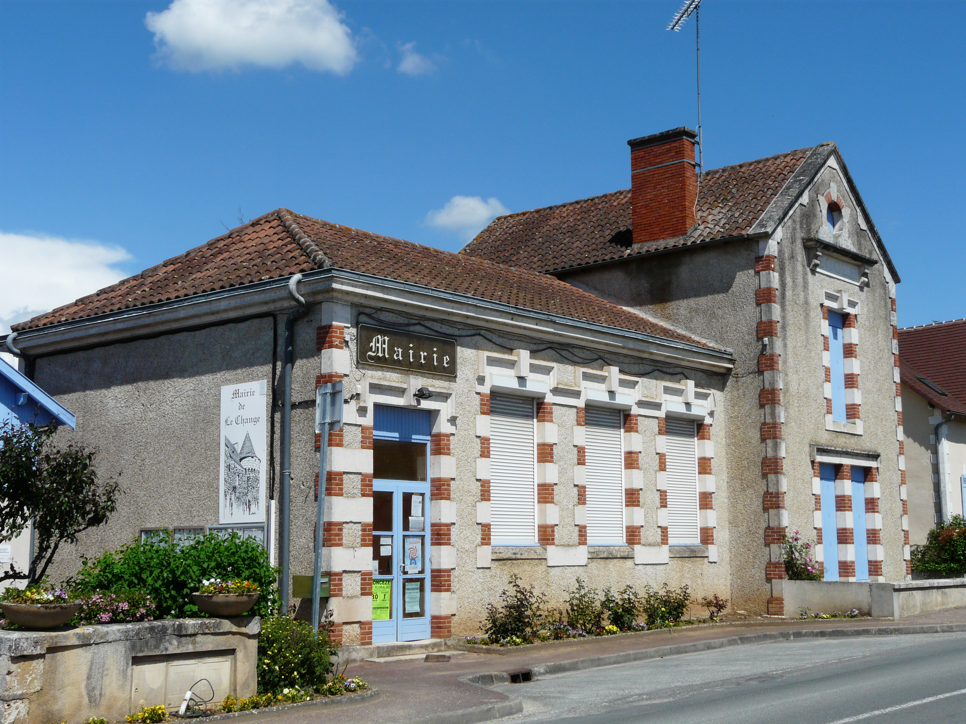 Bâtiment de la mairie, Le Change, Dordogne, France.